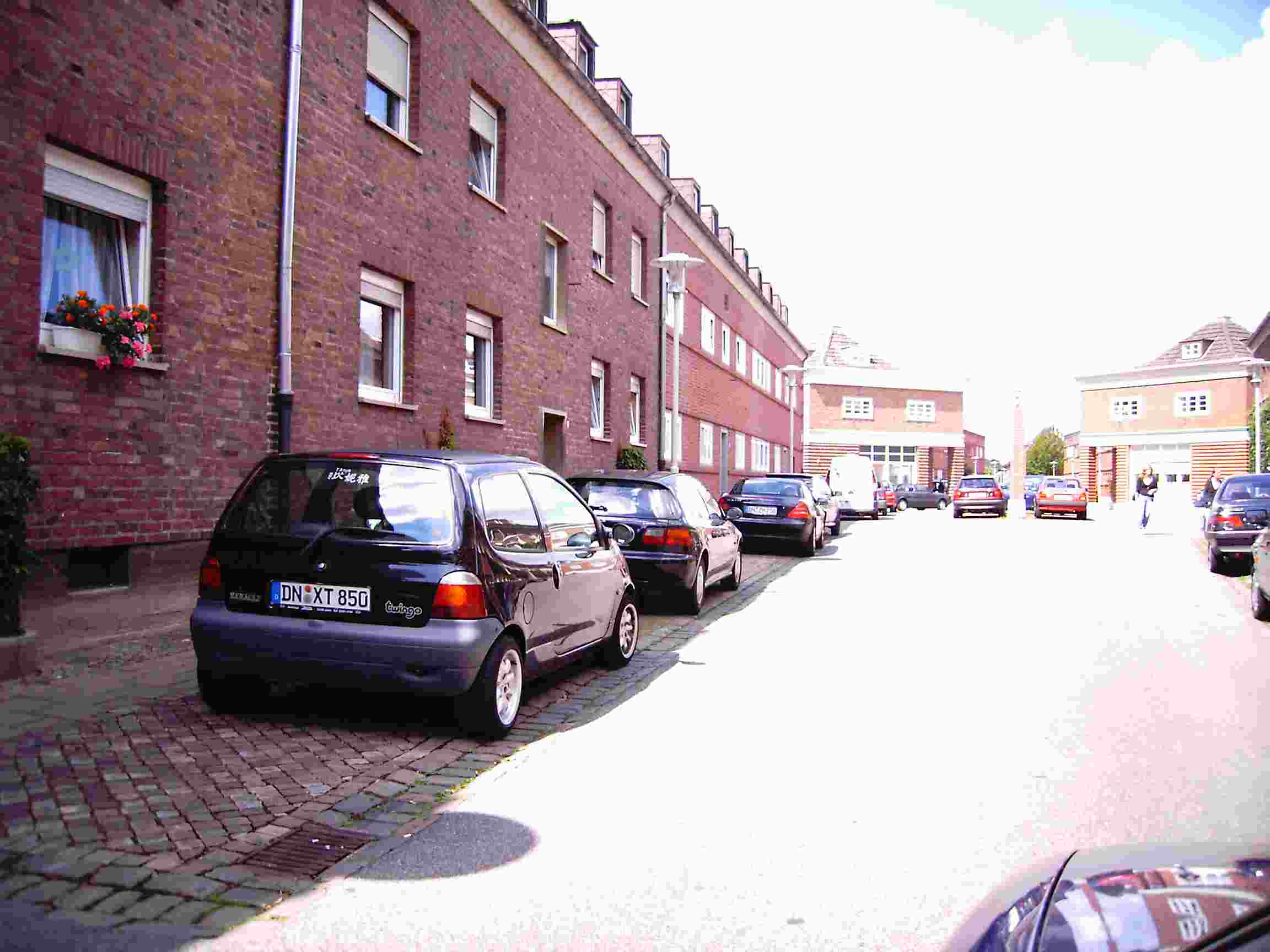 Grüngürtel (Düren) 1 own work papa1234 2006-08-13